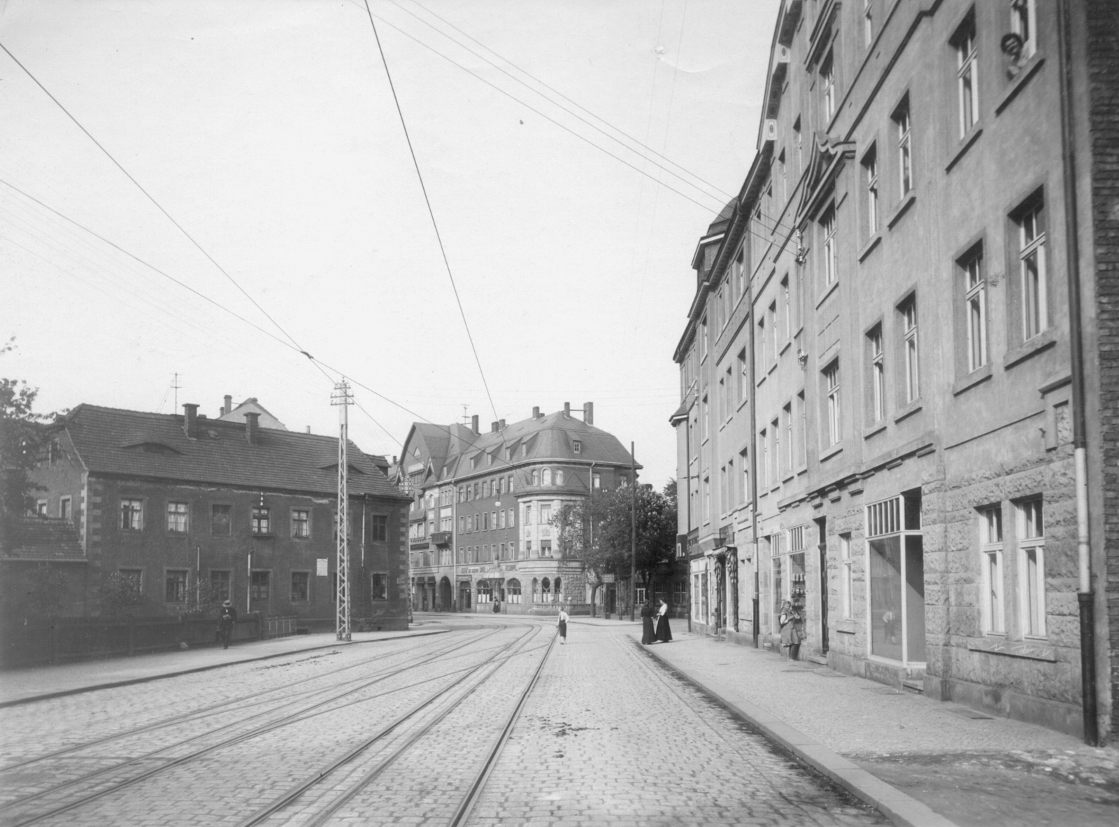 Potschappel (Freital-Potschappel). Untere Dresdner Straße (Dresdner Straße). Blick zum Gasthof zum Goldenen Löwen